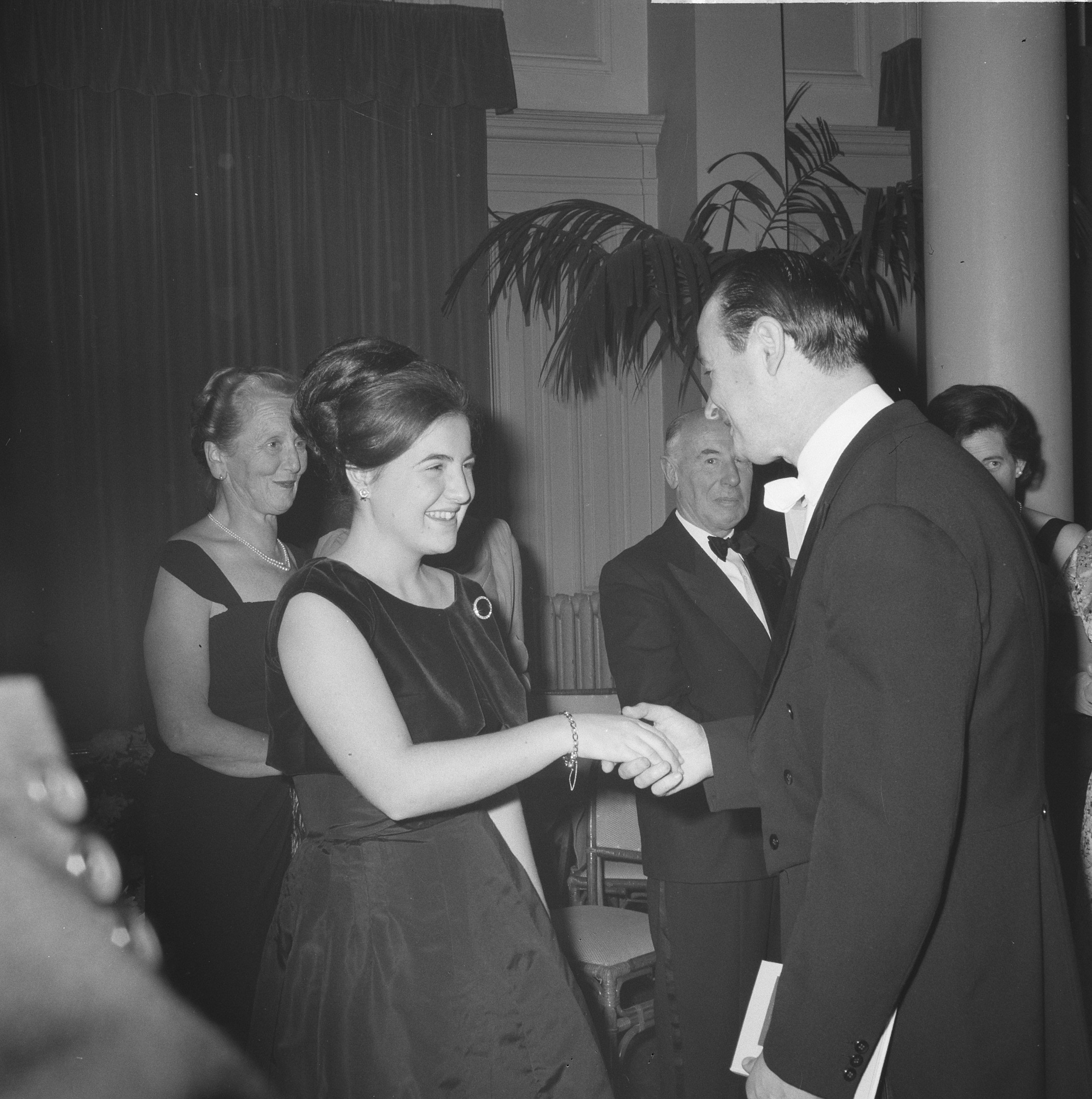 Prinses Margriet jubileumconcert bijgewoond 150-jarig bestaan van het Noordhollands Philharmonisch Orkest te Haarlem. De prinses voorgesteld aan [dirigent Henri Arends]. 29 november 1963